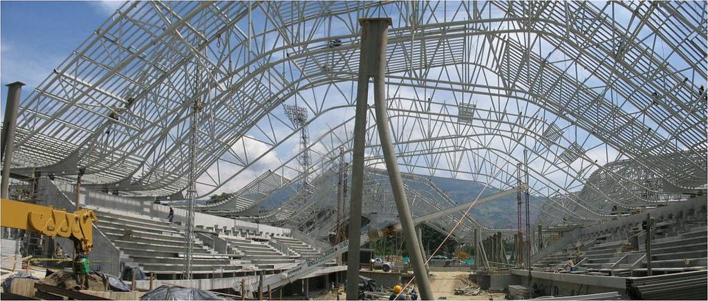 Voleibol contará con un nuevo coliseo que albergará a 2.400 espectadores y tendrá una cancha principal y dos auxiliares para entrenamiento